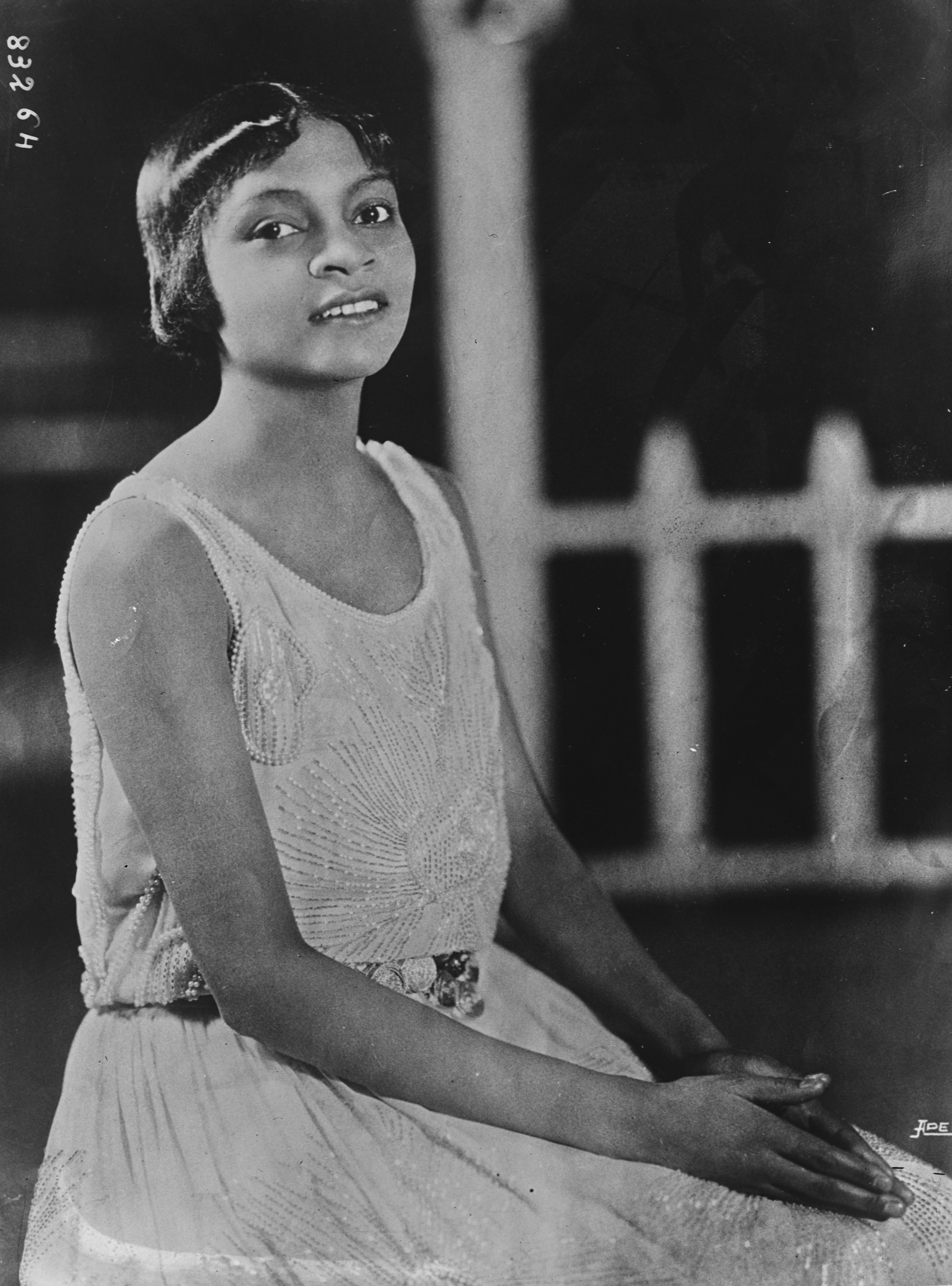 Miss Florence Mills : [photographie de presse] / [Agence Rol]